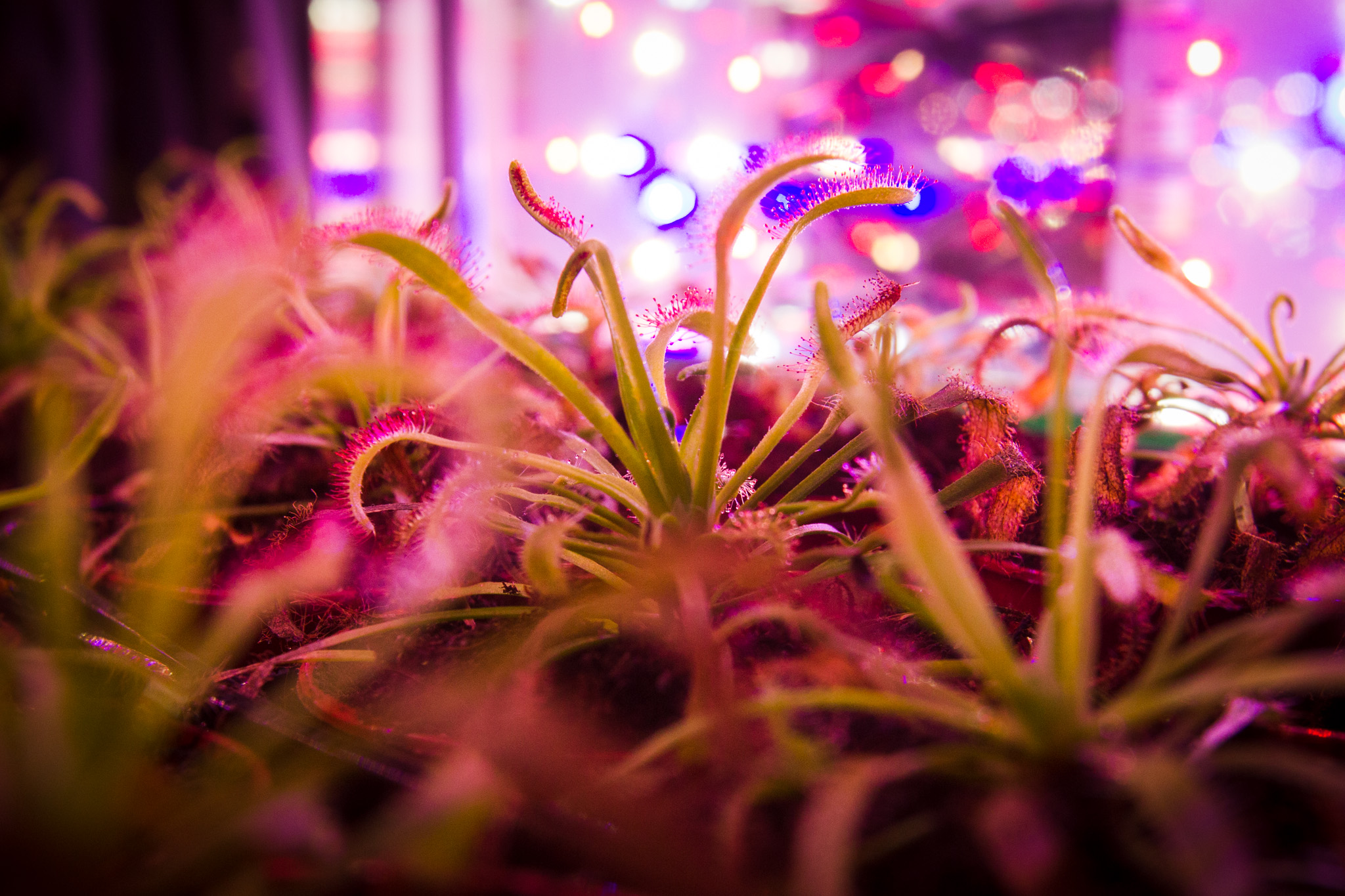 Rośliny w laboratorium biologicznym. Centrum Nauki Kopernik. fot. Robert Kowalewski